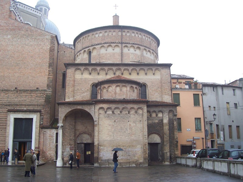 Padova - Battistero